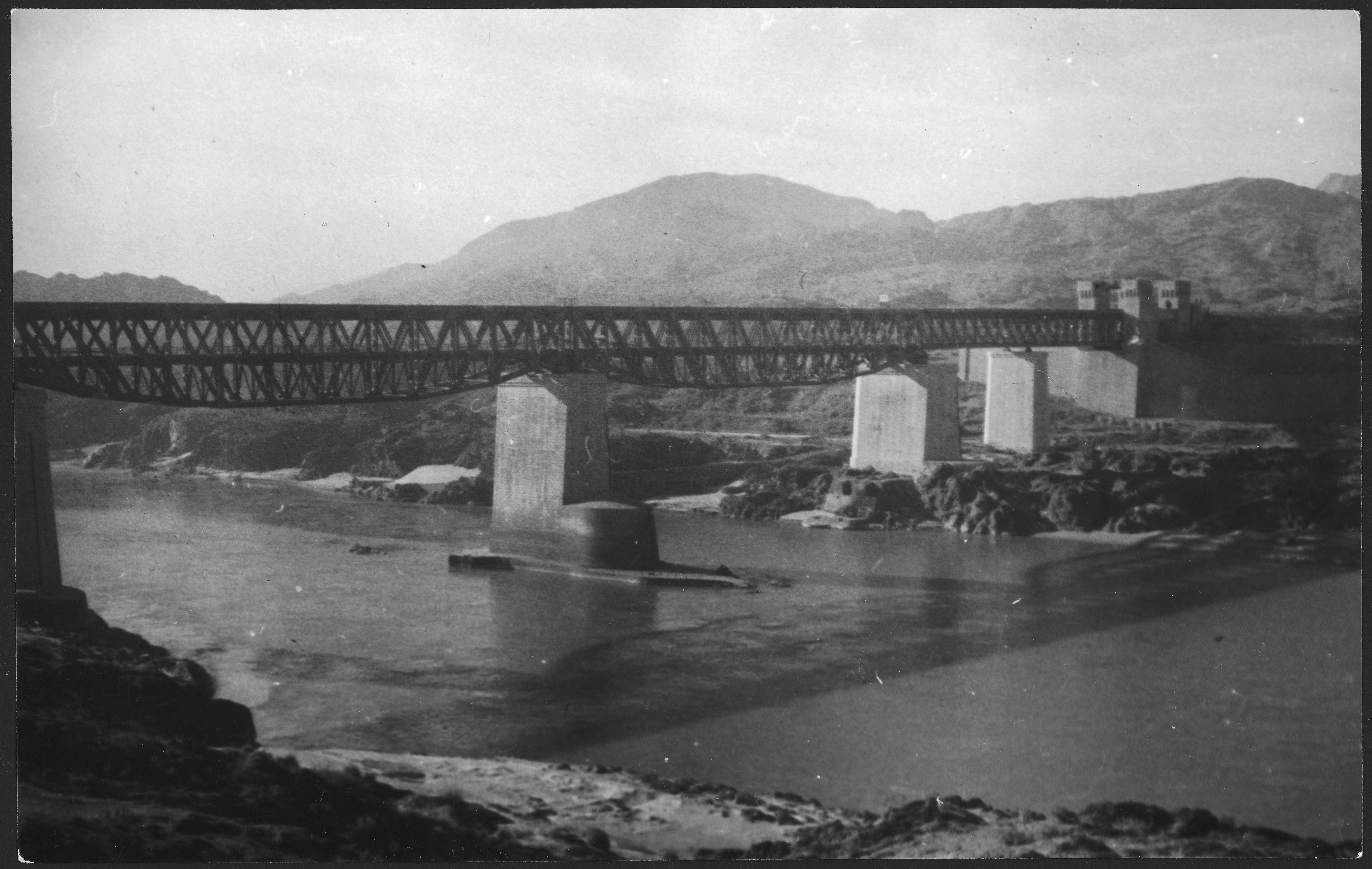 Britisch-Indien, Attock: Landschaft; Eine Eisenbrücke auf Betonpfählen über einen breiten Fluss